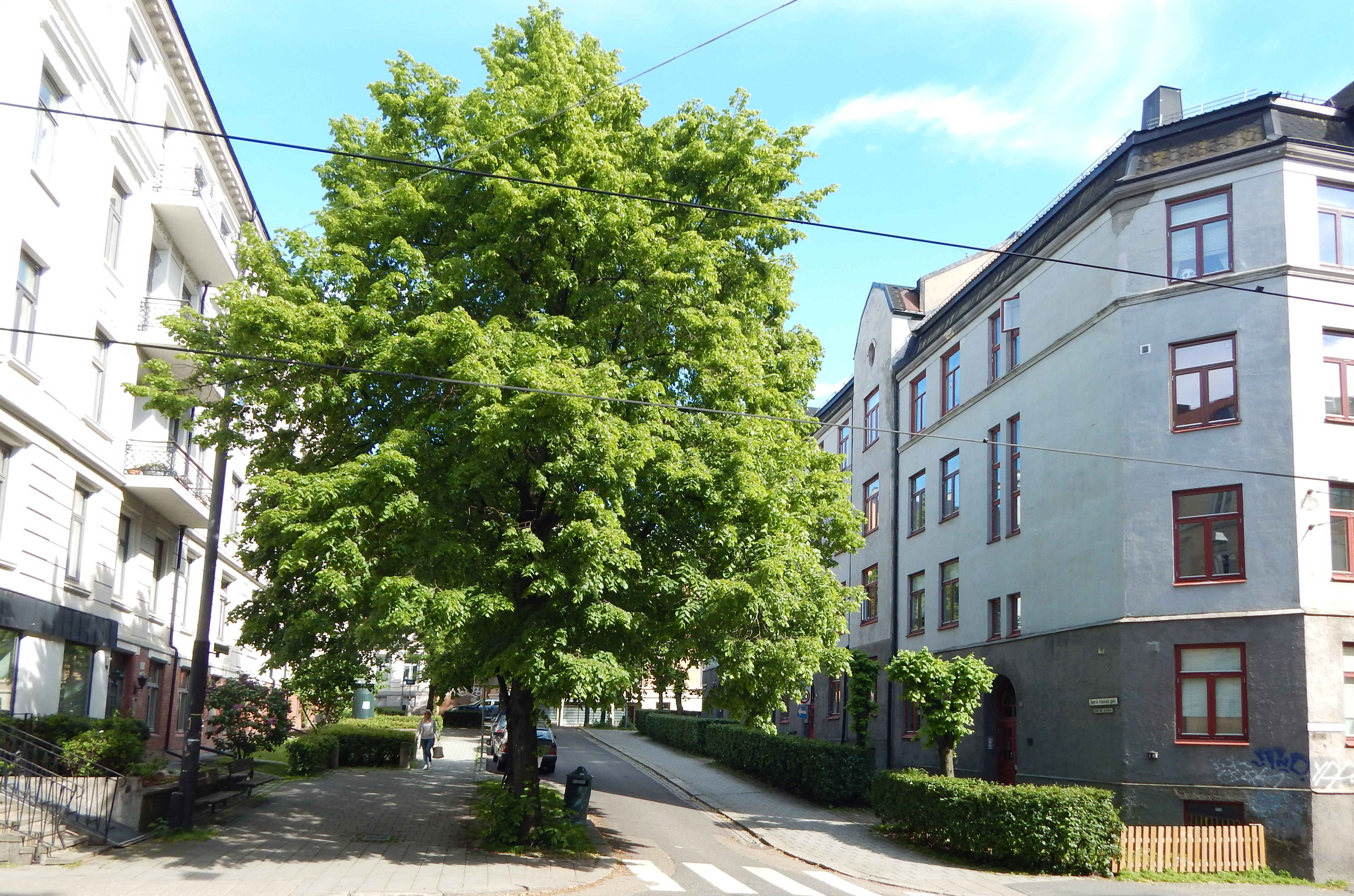 Henrik Klausens gate sett fra Thereses gate